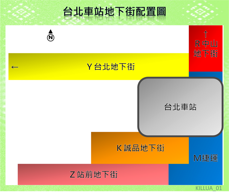 中文（台灣）: R紅:中山地下街Y黃:台北地下街Z粉紅:站前地下街K橘:誠品地下街(誠品站前店)M藍:捷運地下街(台北車站地下商場)(誠品站前店)